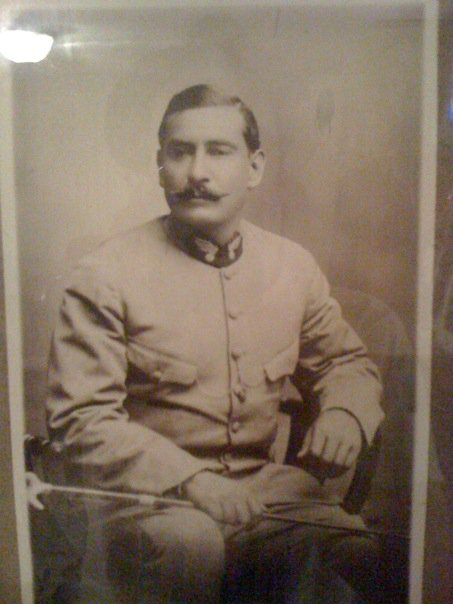 Retrato del General Miguel Saavedra circa 1917